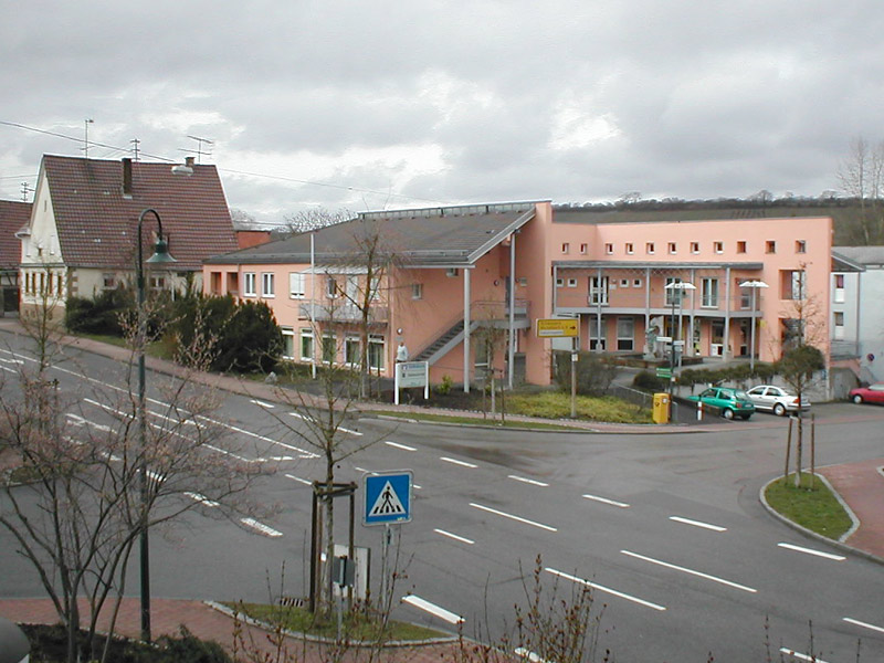 Löweneck in Zaberfeld, erster Teilabschnitt des neuen Ortskerns, errichtet 1993